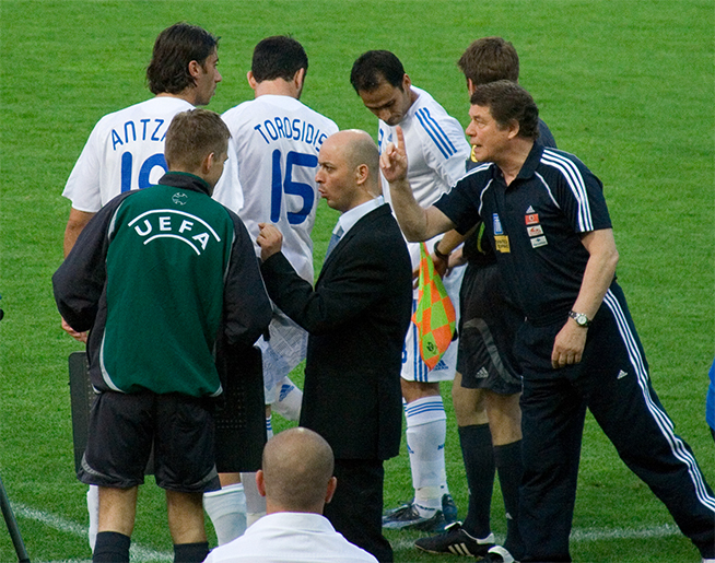 Trainer Otto Rehhagel (rechts im Bild) gibt vor der Einwechslung letzte Anweisungen